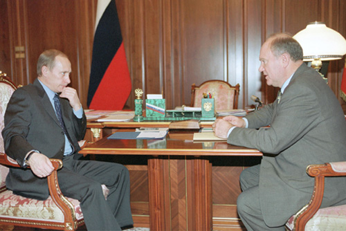 МОСКВА, КРЕМЛЬ. С руководителем фракции КПРФ в Государственной Думе Геннадием Зюгановым.